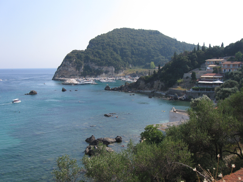 Аутор: Корисник:SmirnofLeary, август 2009. године. Залив Paleo-Kastritsa, са западное стране острва Крф.